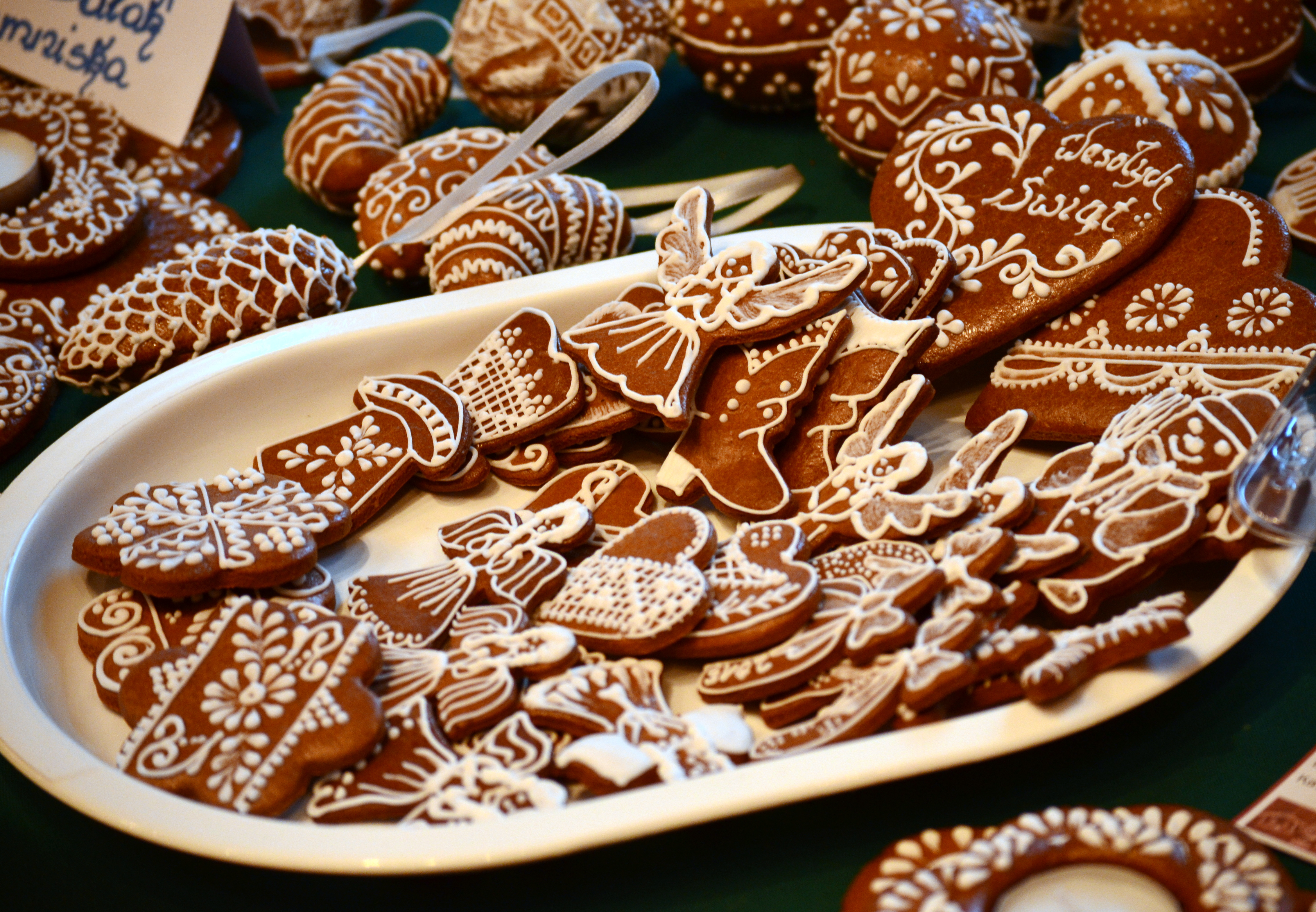 02014 Die traditionelle Adventkirmes in Sanok